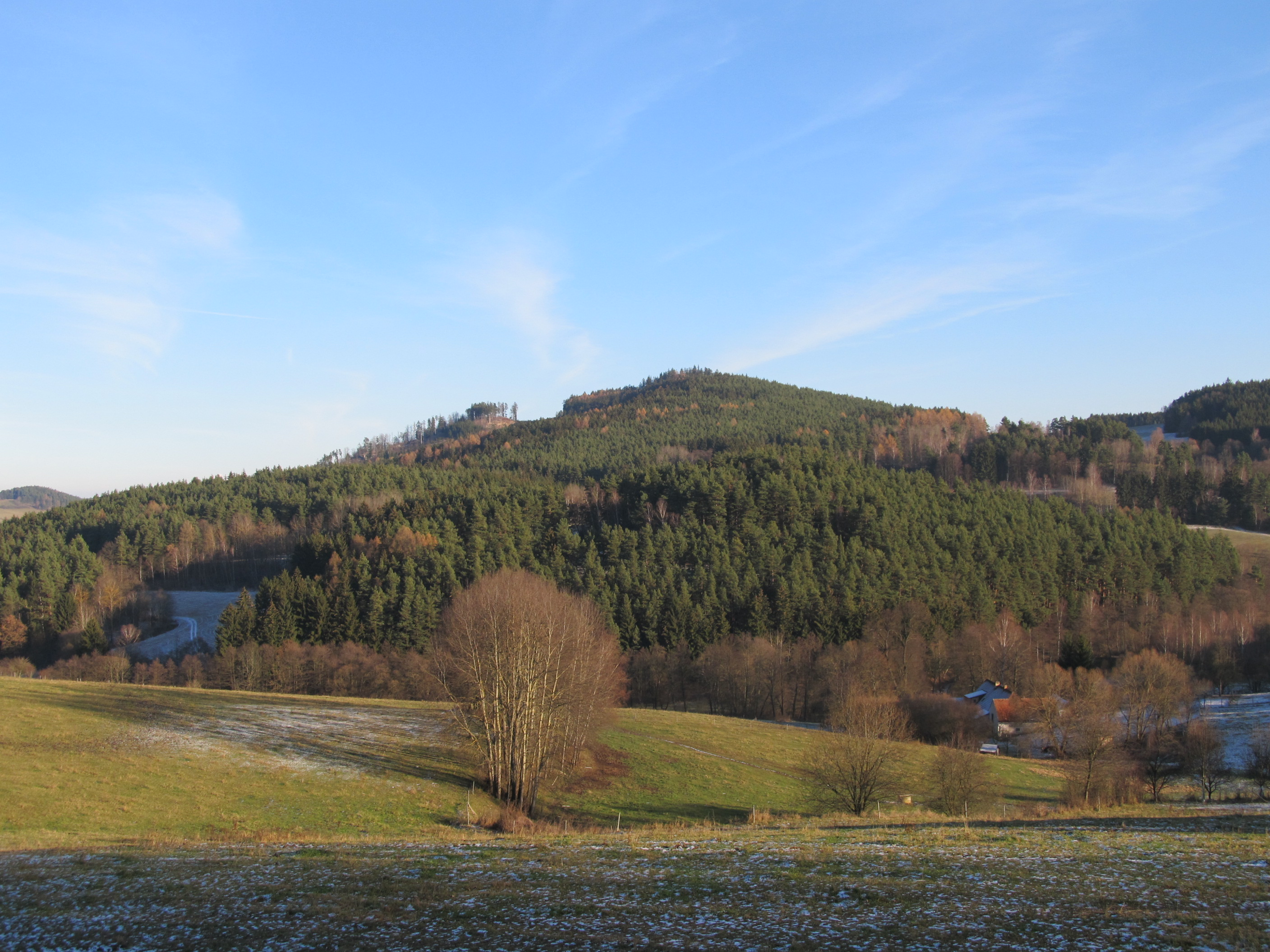 Hradčany - pohled na vrch Věnec s halštatským hradištěm